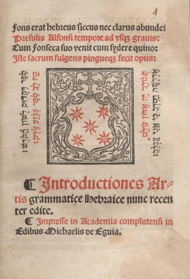 Portada del libro titulado en latín Introductionis artis Grammaticae hebraica. Es una introducción a la gramática hebrea. Publicado por Alfonso de Zamora, e impreso en Alcalá de Henares por Miguel de Eguía el 1 de mayo de 1526.